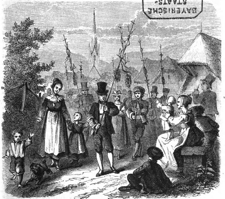 Palmsonntag in Rippoldsau